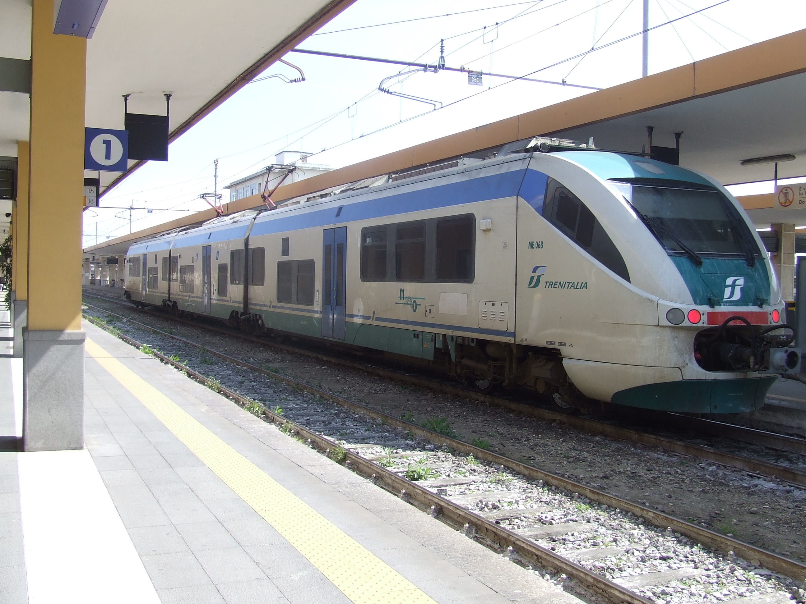 Komfortabler klimatisierter Elektrotriebwagenzug Minuetto der Firma Alstom. Hier ein Exemplar der italienischen Eisenbahn Trenitalia auf dem Bahnhof der Stadt Catania auf Sizilien, das auf der Strecke nach Messina verkehrt.